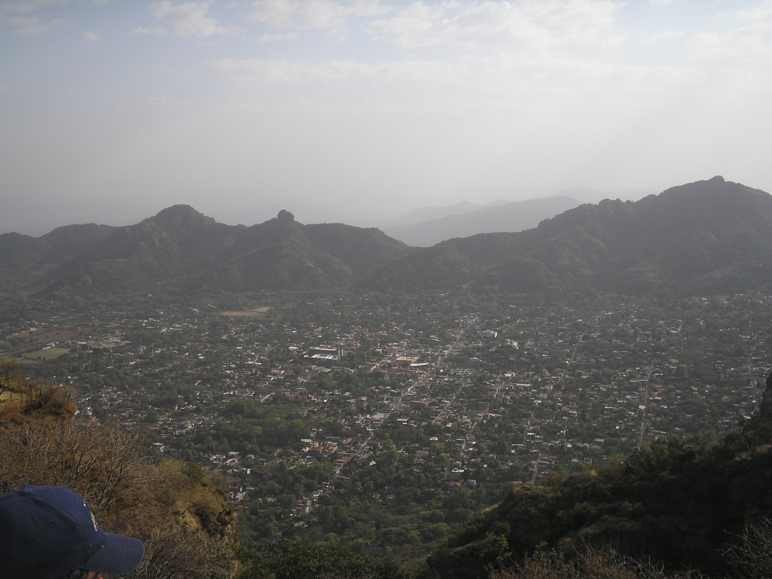 Vista de Tepoztlan tomada desde la Piramide